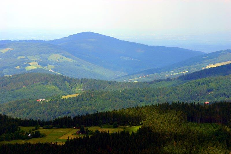 Barania Gora in Beskid Slaski (Poland)